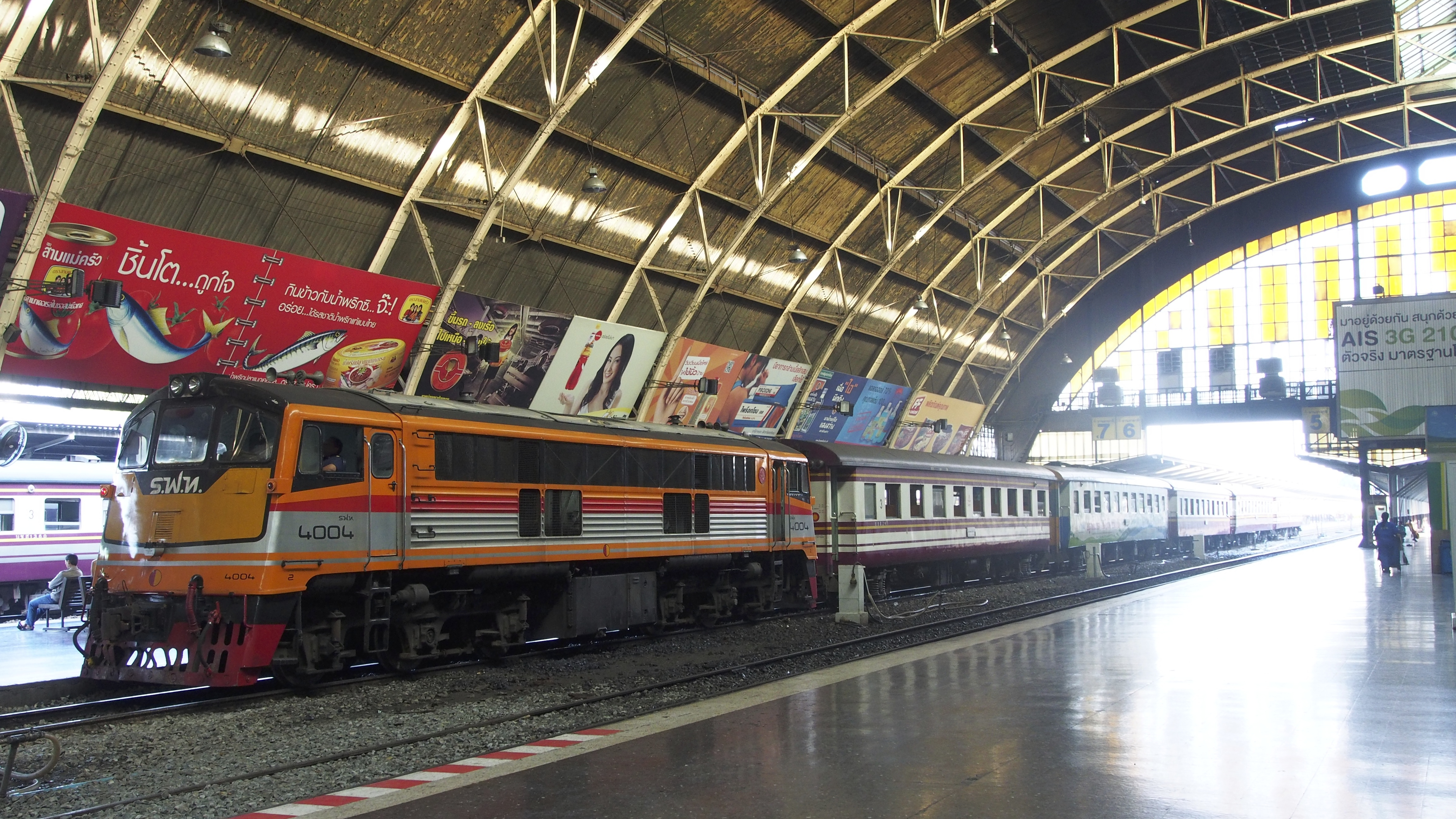 GE UM12 Locomotive